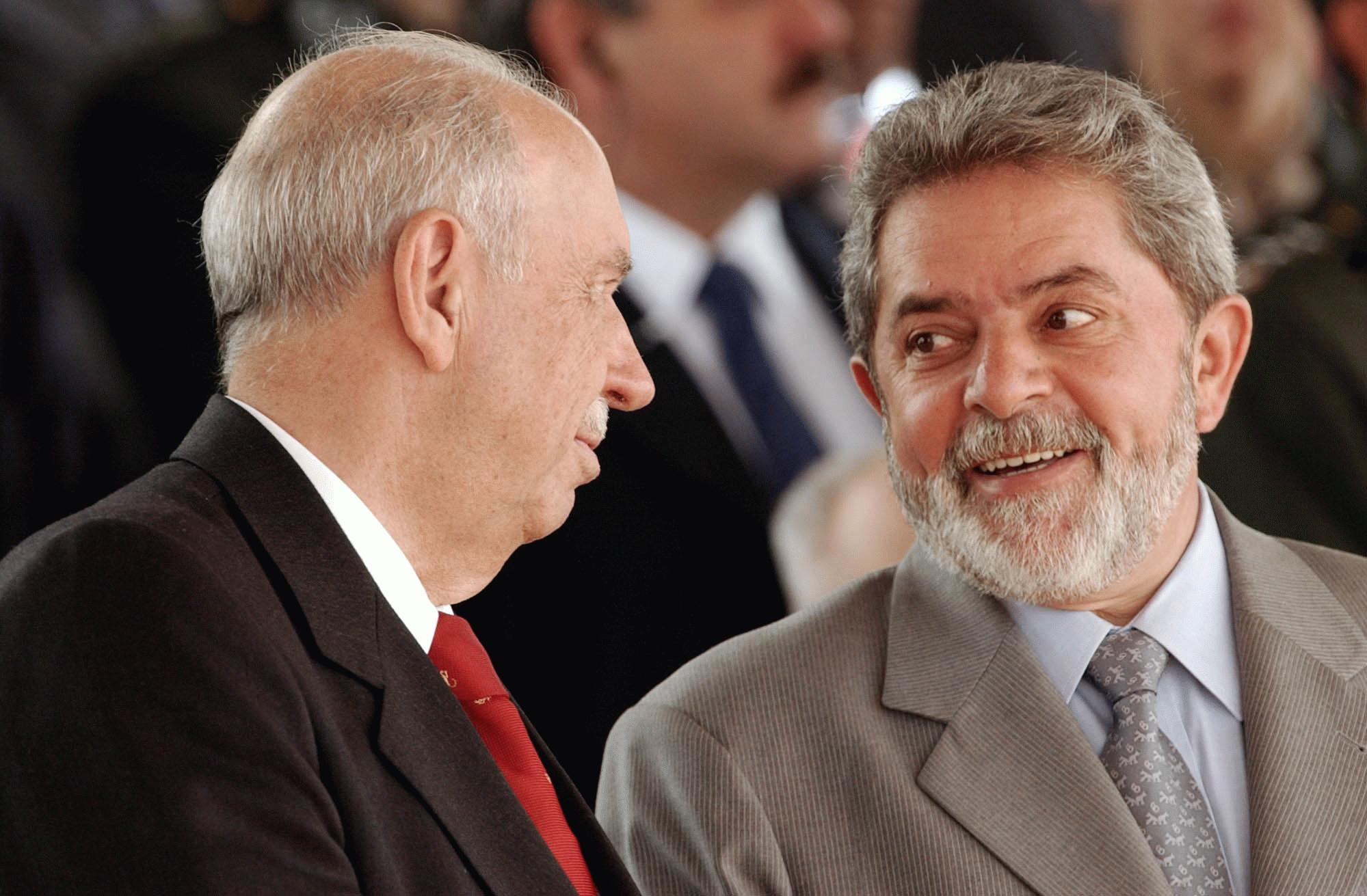 Brasília - Presidente Luiz Inácio Lula da Silva conversa com o vice José Alencar durante embaque de militares brasileiras para o Haiti.